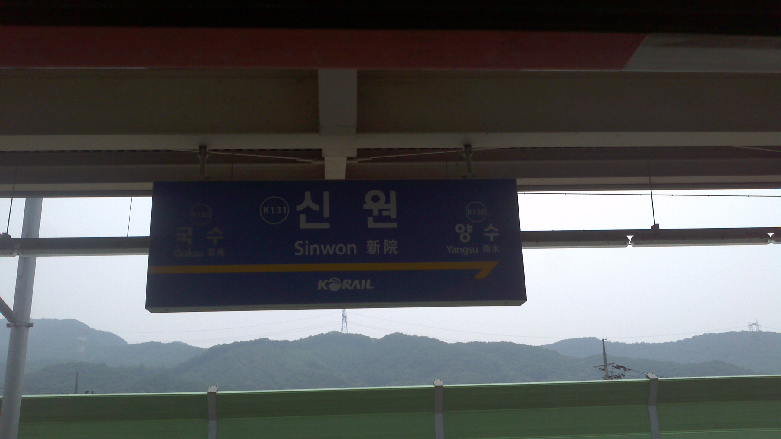 신원역 역명판